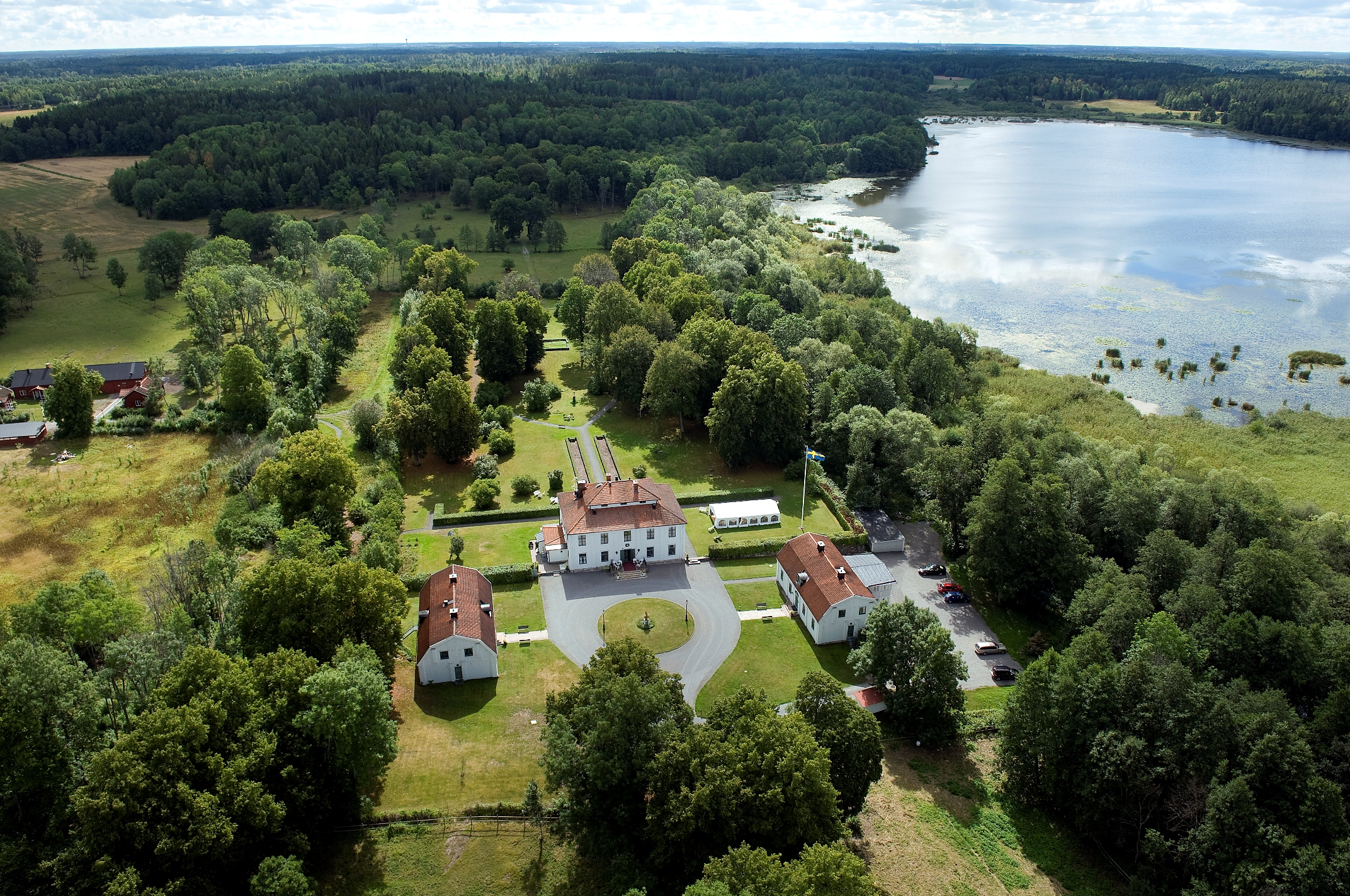 Noors slott och Säbysjön.